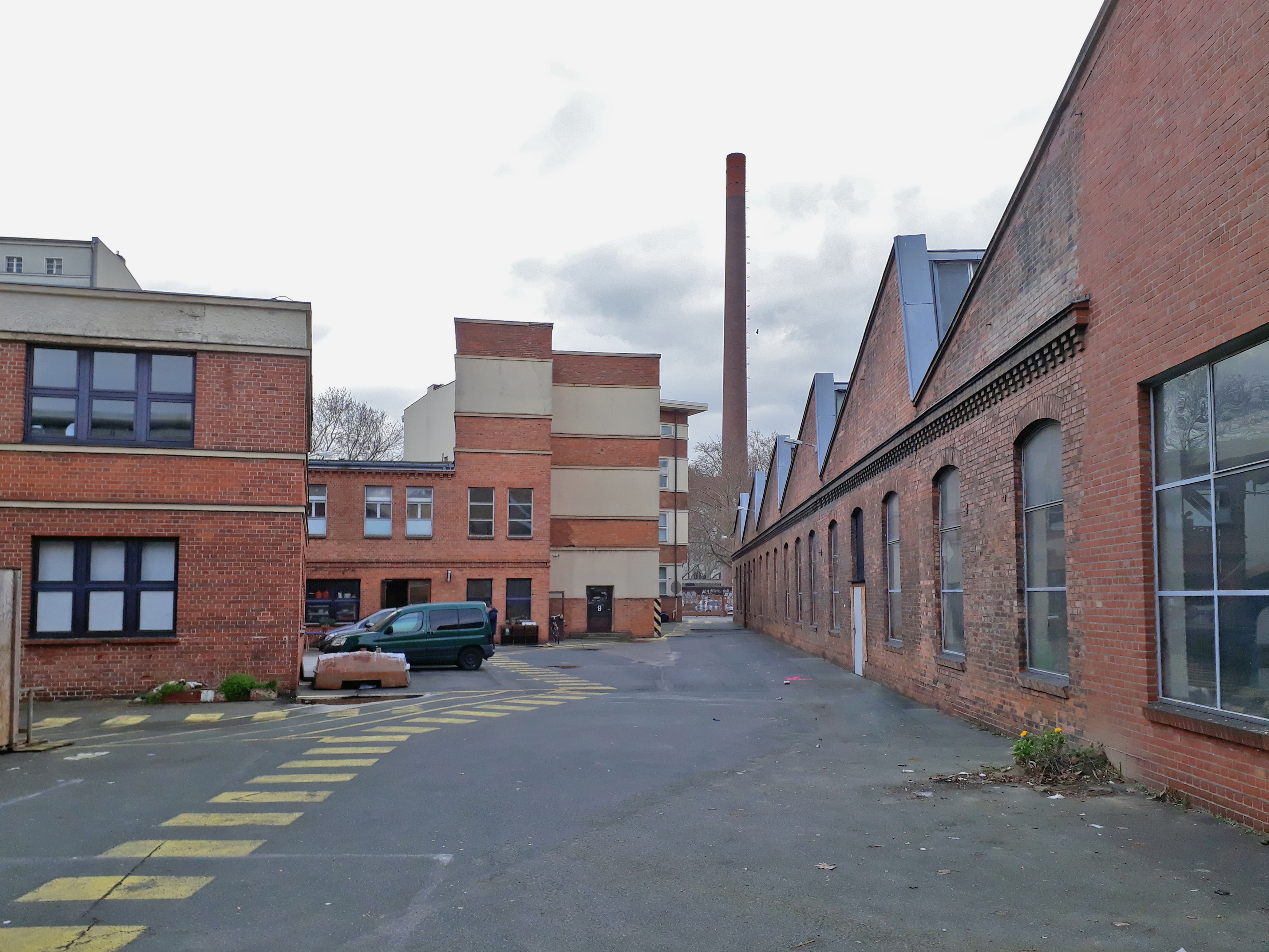 Uferhallen Berlin, Innenhof, Blick Süd Ostlich, Uferstraße 8-11